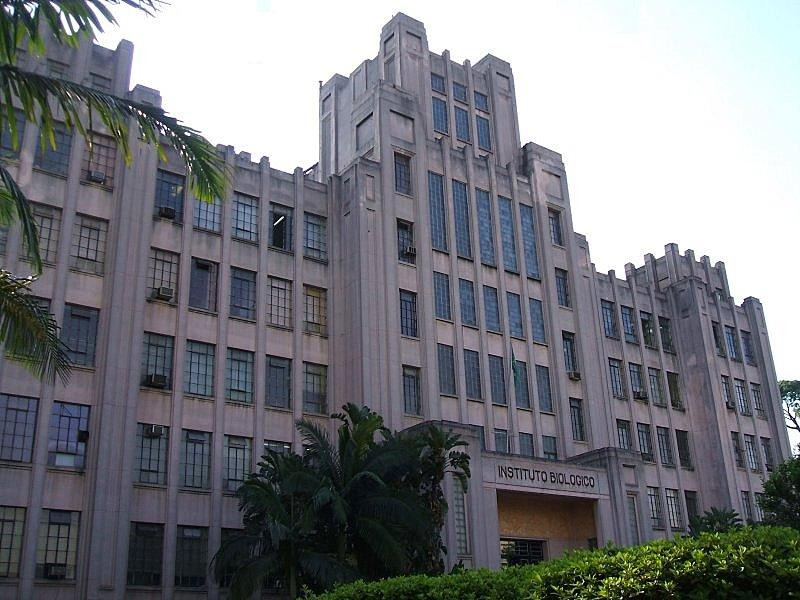 Instituto Biológico, em São Paulo, Brasil